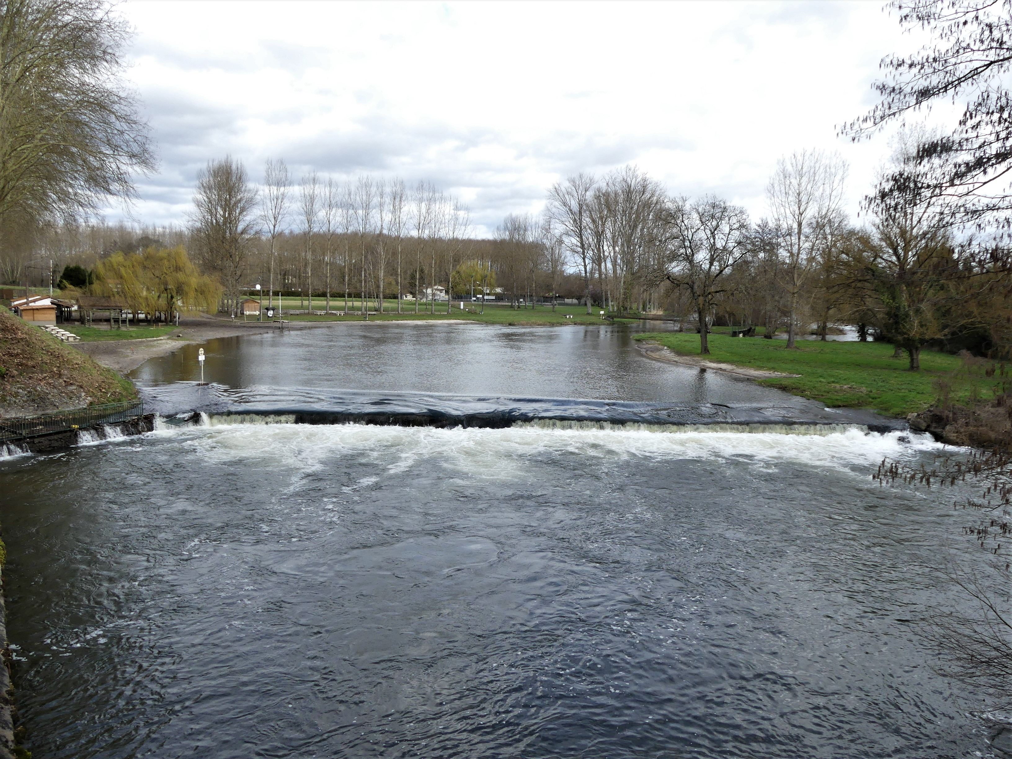 La Dronne en amont du pont de la route départementale 38, Saint-Aulaye, commune de Saint Aulaye-Puymangou, Dordogne, France.